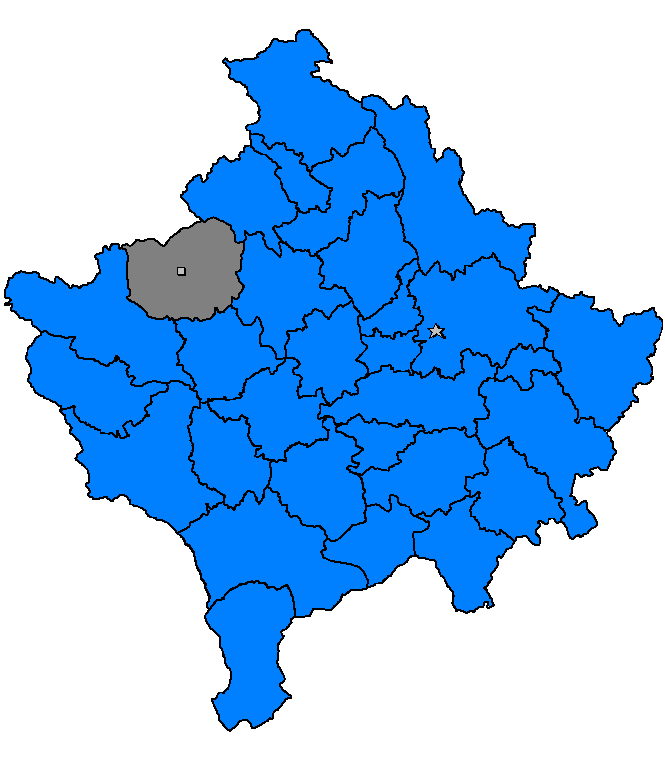 Istog, Kosovë 2006